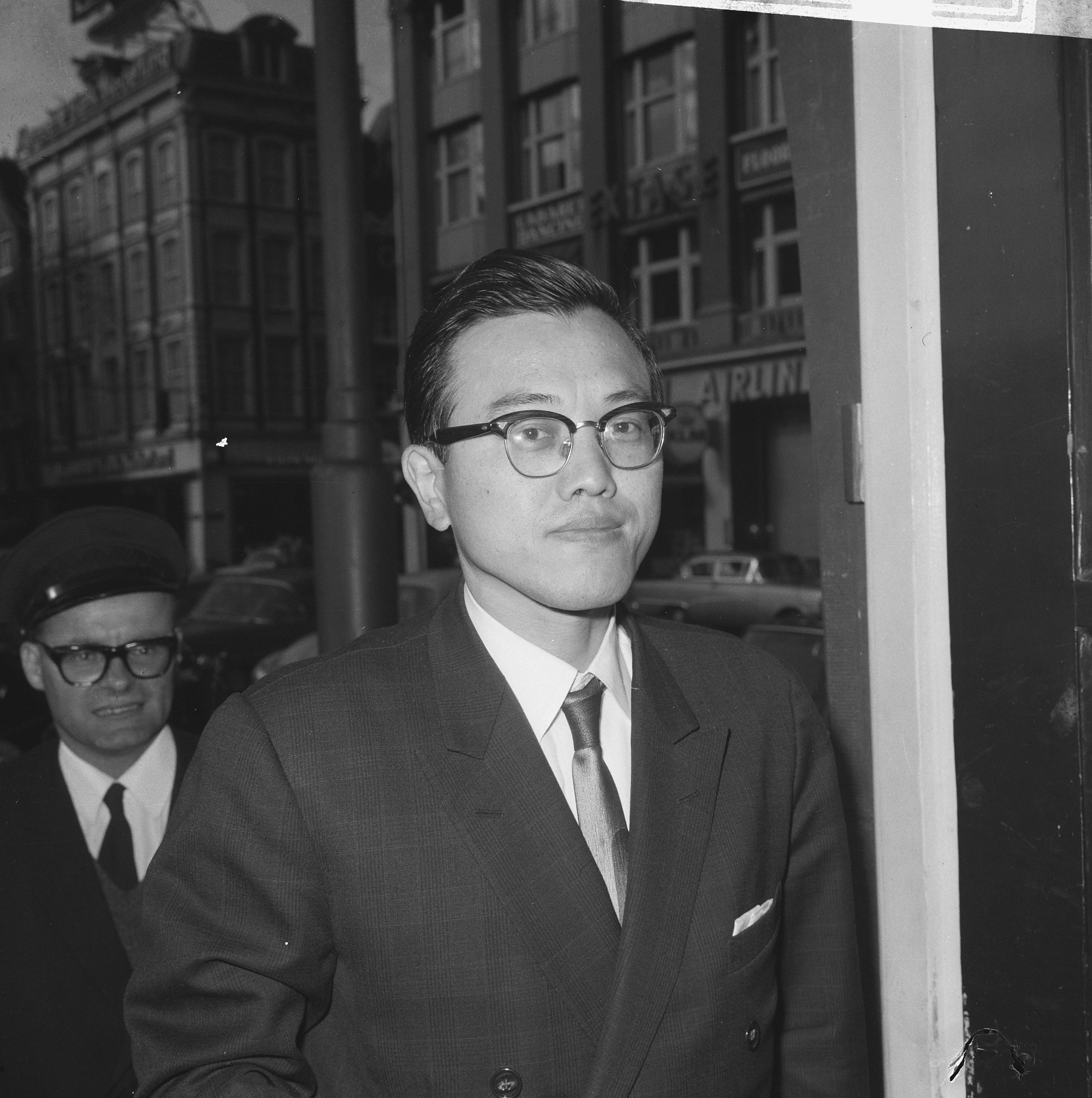 Collectie / Archief : Fotocollectie Anefo Reportage / Serie : [ onbekend ] Beschrijving : Japanse ambassade attache de heer Nankajima op politiebur Leidseplein (in verband met koffermoord) Datum : 10 september 1965 Trefwoorden : ambassades, attaches, politiebureaus Fotograaf : Nijs, Jac. de / Anefo Auteursrechthebbende : Nationaal Archief Materiaalsoort : Negatief (zwart/wit) Nummer archiefinventaris : bekijk toegang 2.24.01.03 Bestanddeelnummer : 918-1689